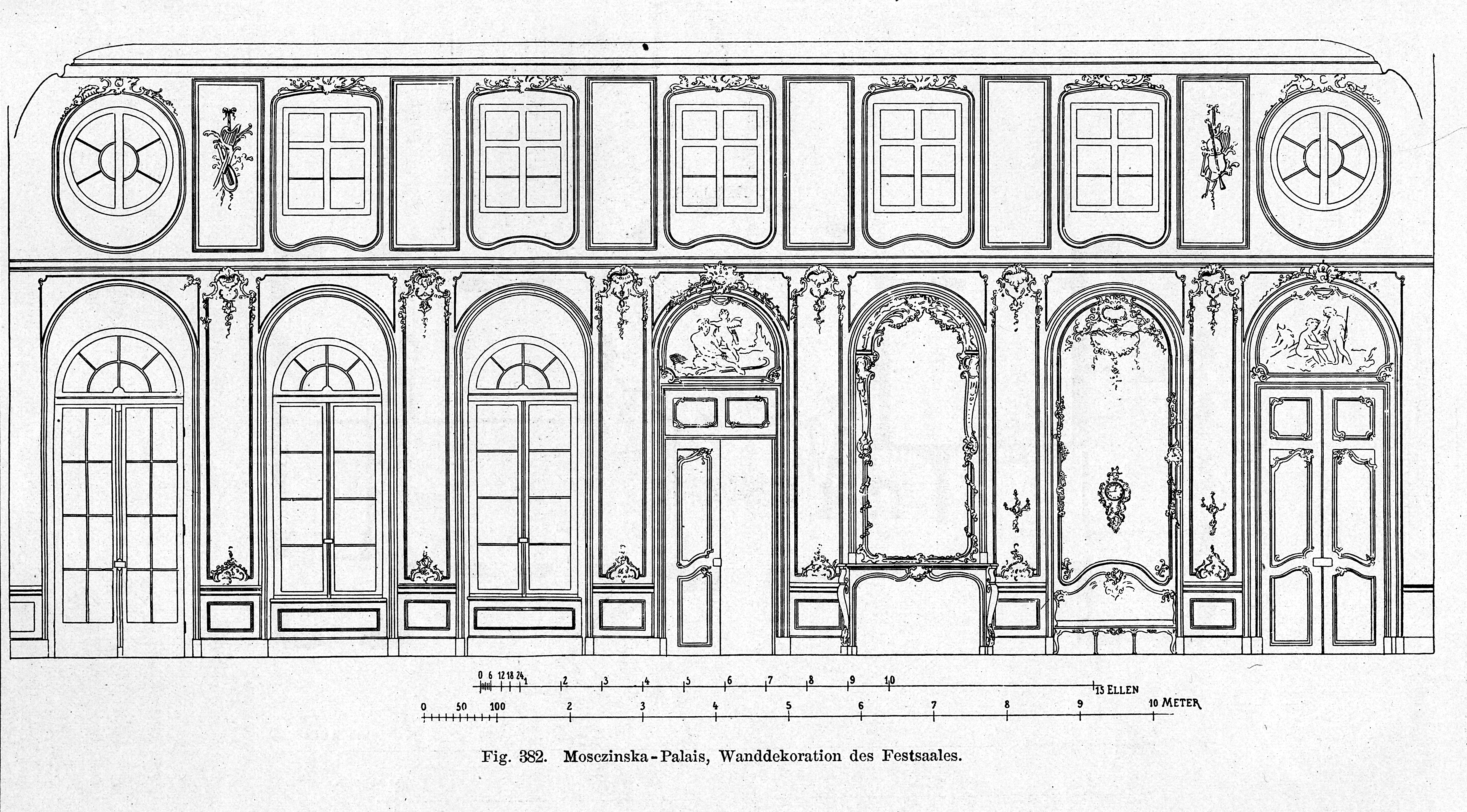 Dresden, Mosczinska - Palais, Wanddekoration des Festsaales